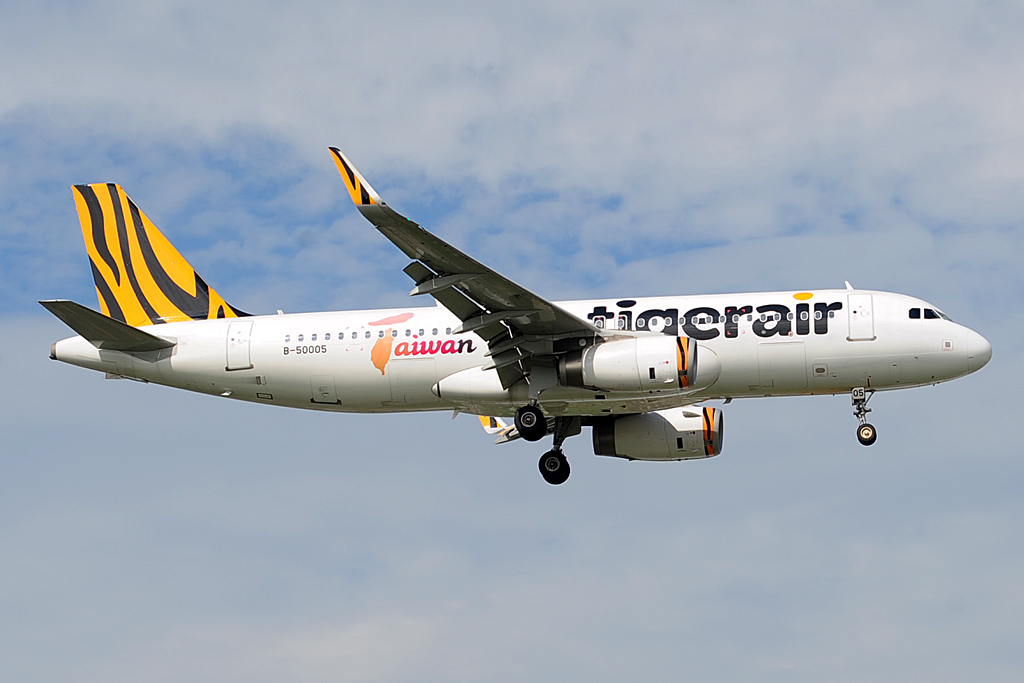 Tigerair Taiwan A320-232 B-50005 landing at Taoyuan on November 19, 2016.